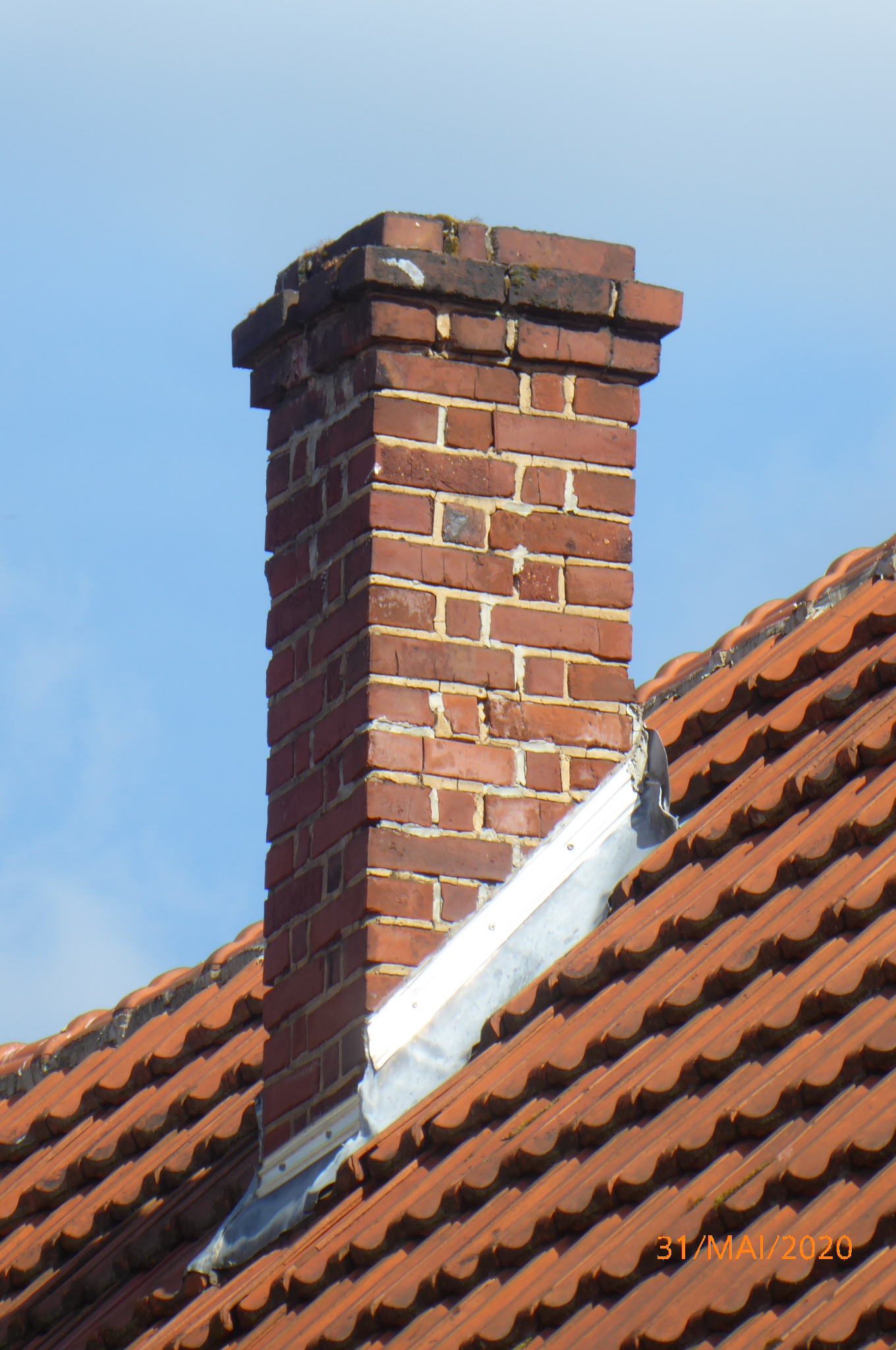 Historischer Schornsteinkopf aus Ziegelmauerwerk mit Krempe, 19. Jahrhundert (Hann. Münden-Bonaforth, Am Felde 1)